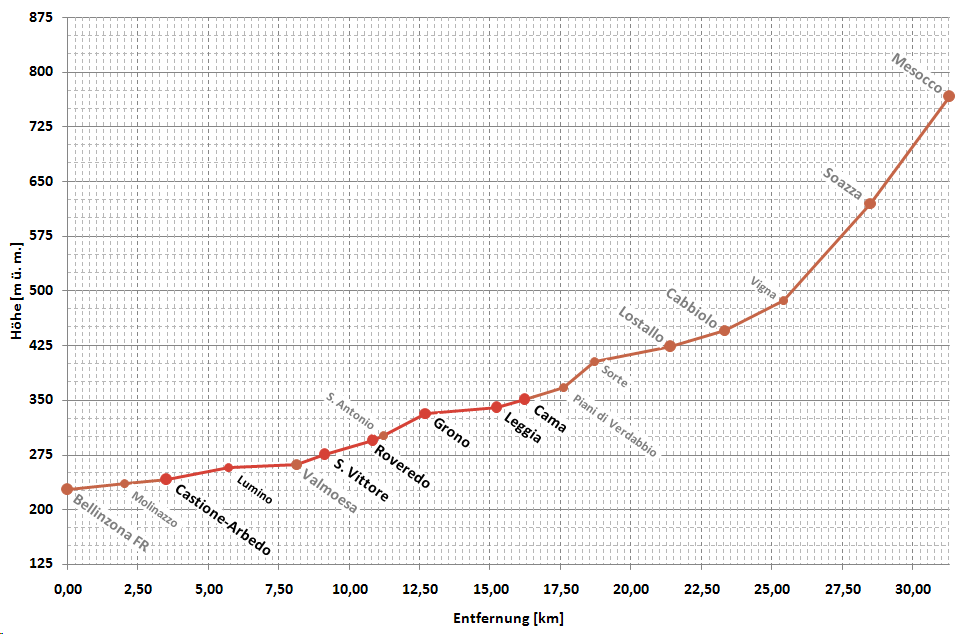 vereinfachtes Höhenprofil der Bahnstrecke Bellinzona–Mesocco